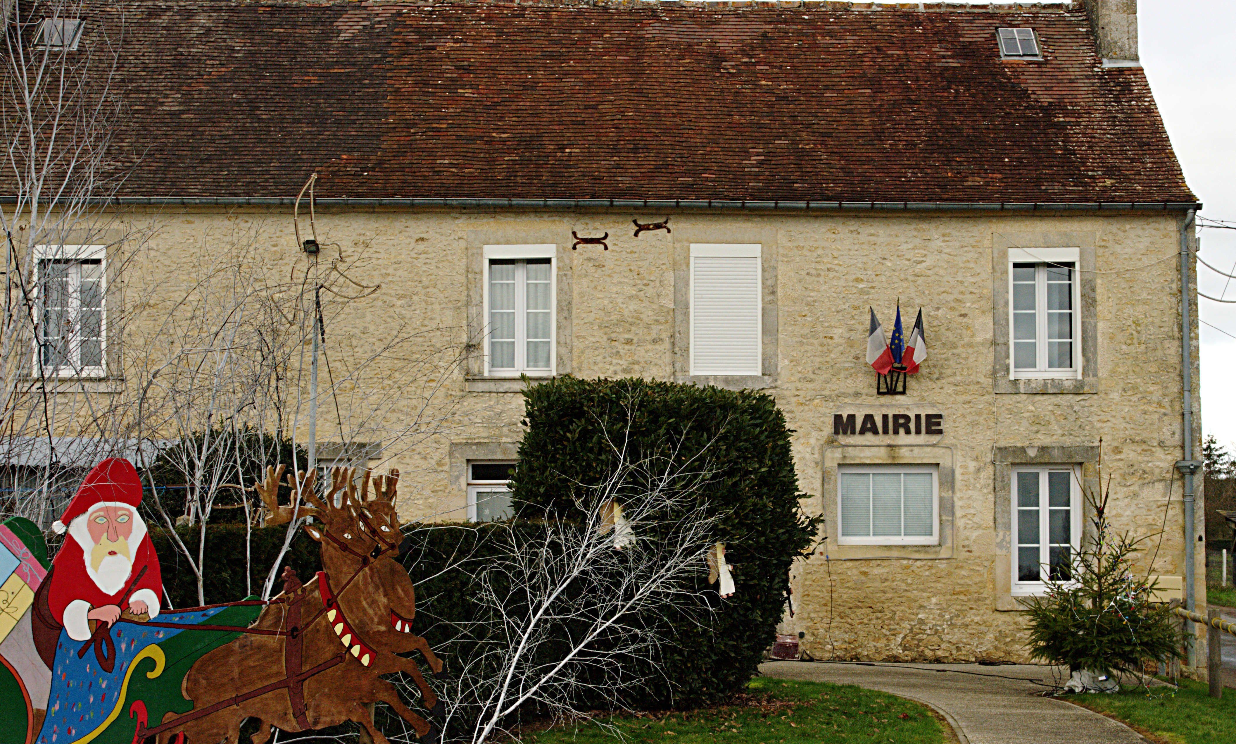 la mairie de Martigny-sur-l'Ante en période de Noël.